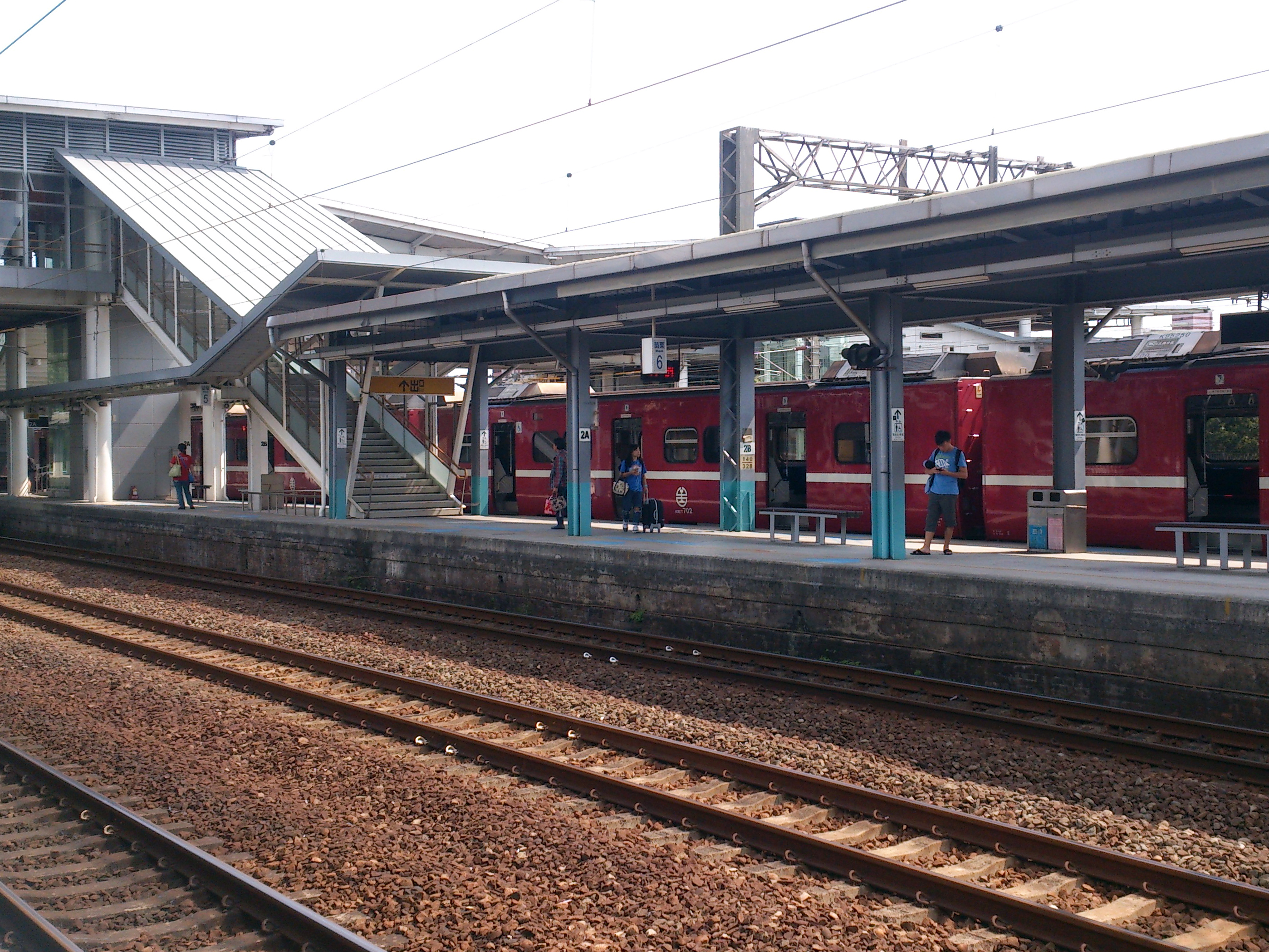 苗栗車站月台